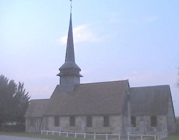 Église de Landepereuse vue de la place